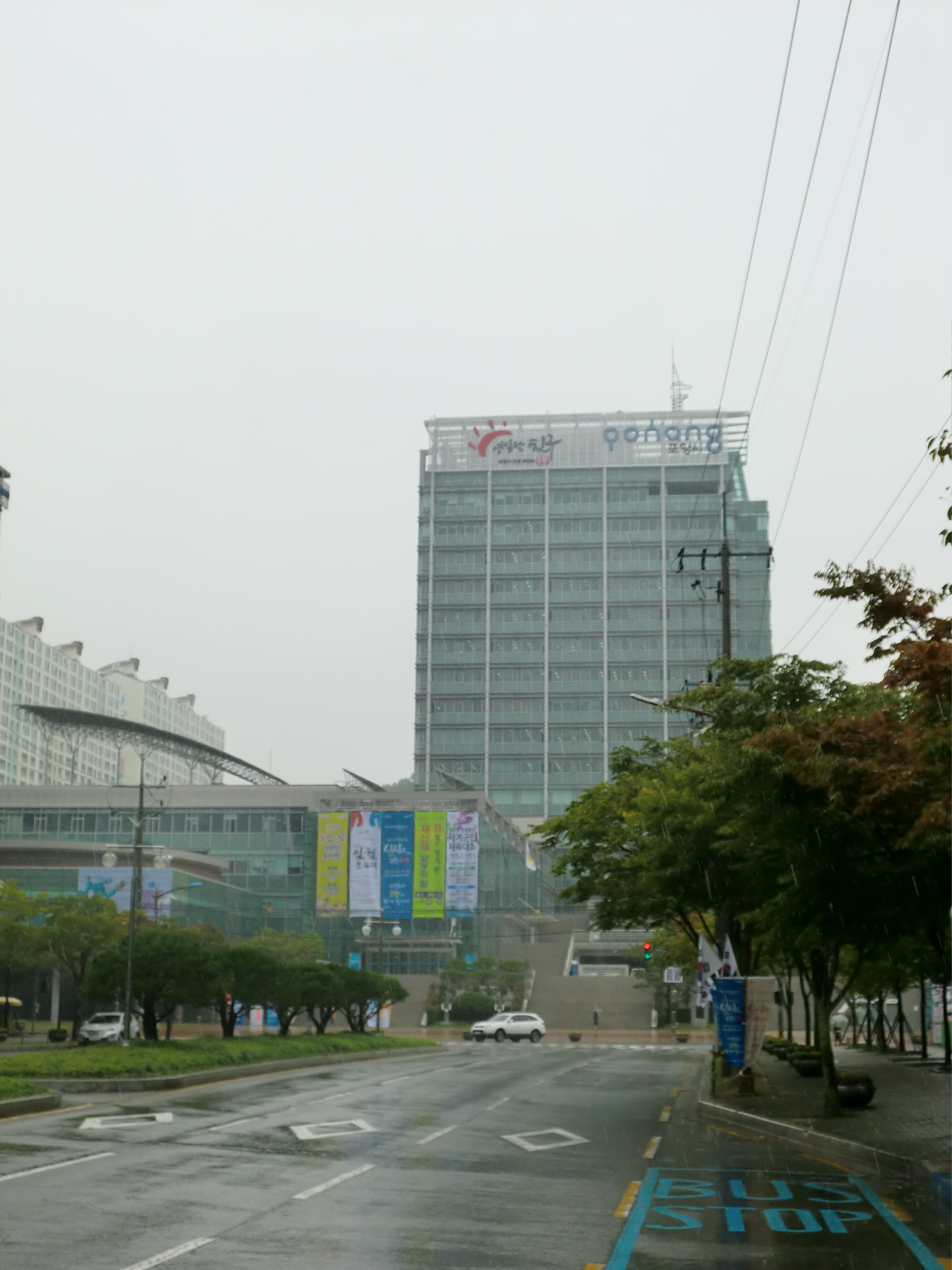 경상북도 포항시에 있는 포항시청